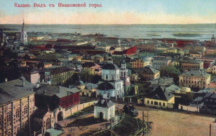 Казань. Вид с Ивановской горы.